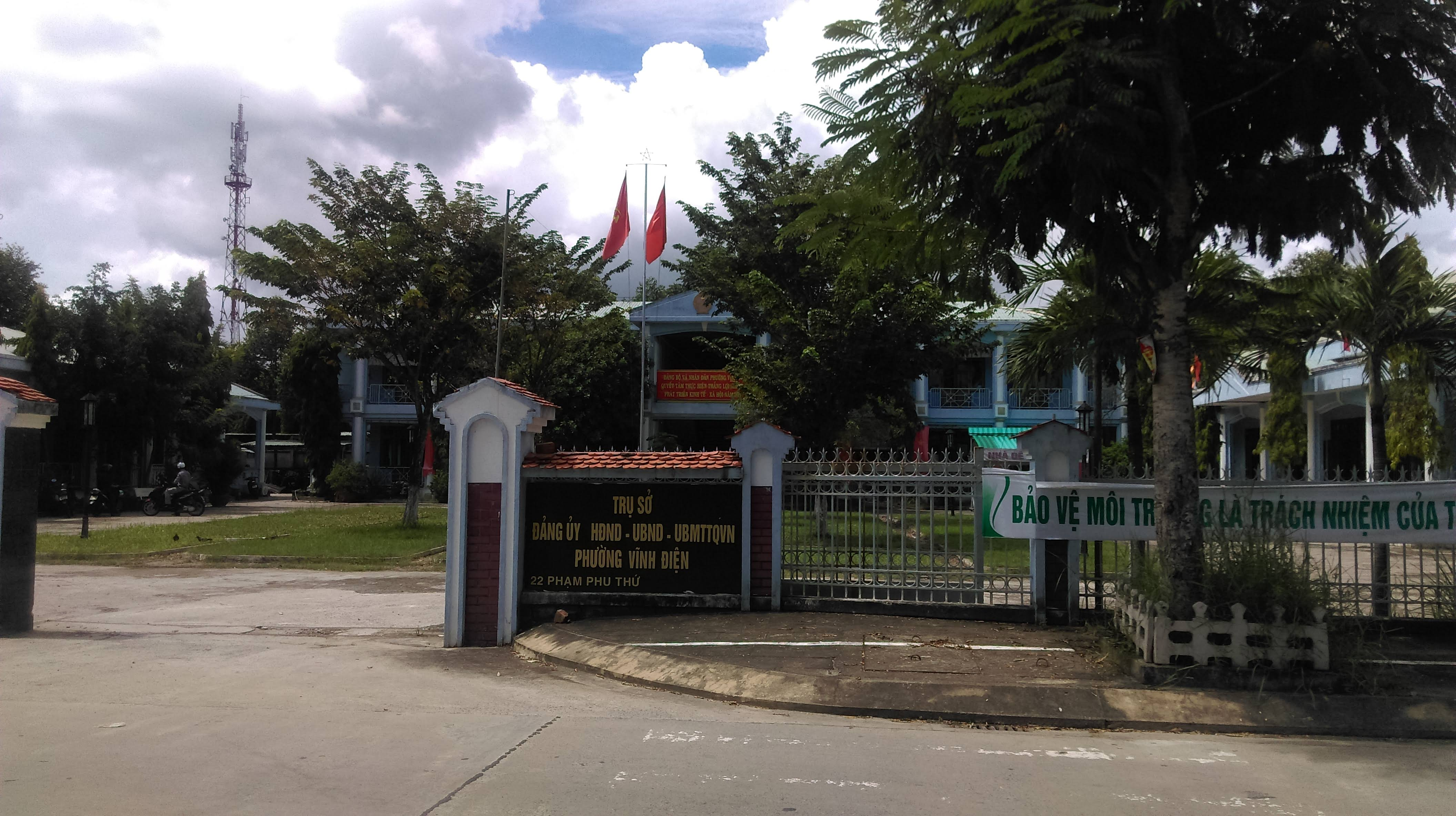 UBND phường Vĩnh Điện, Điện Bàn, Quảng Nam